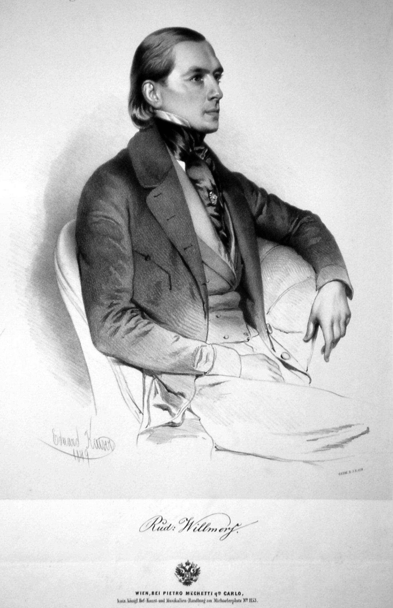 Rudolf Willmers (1821-1878), deutscher Komponist, Pianist, Schachmeister. Lithographie von Eduard Kaiser, 1849